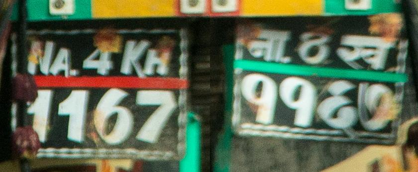 Зображення номерного знаку